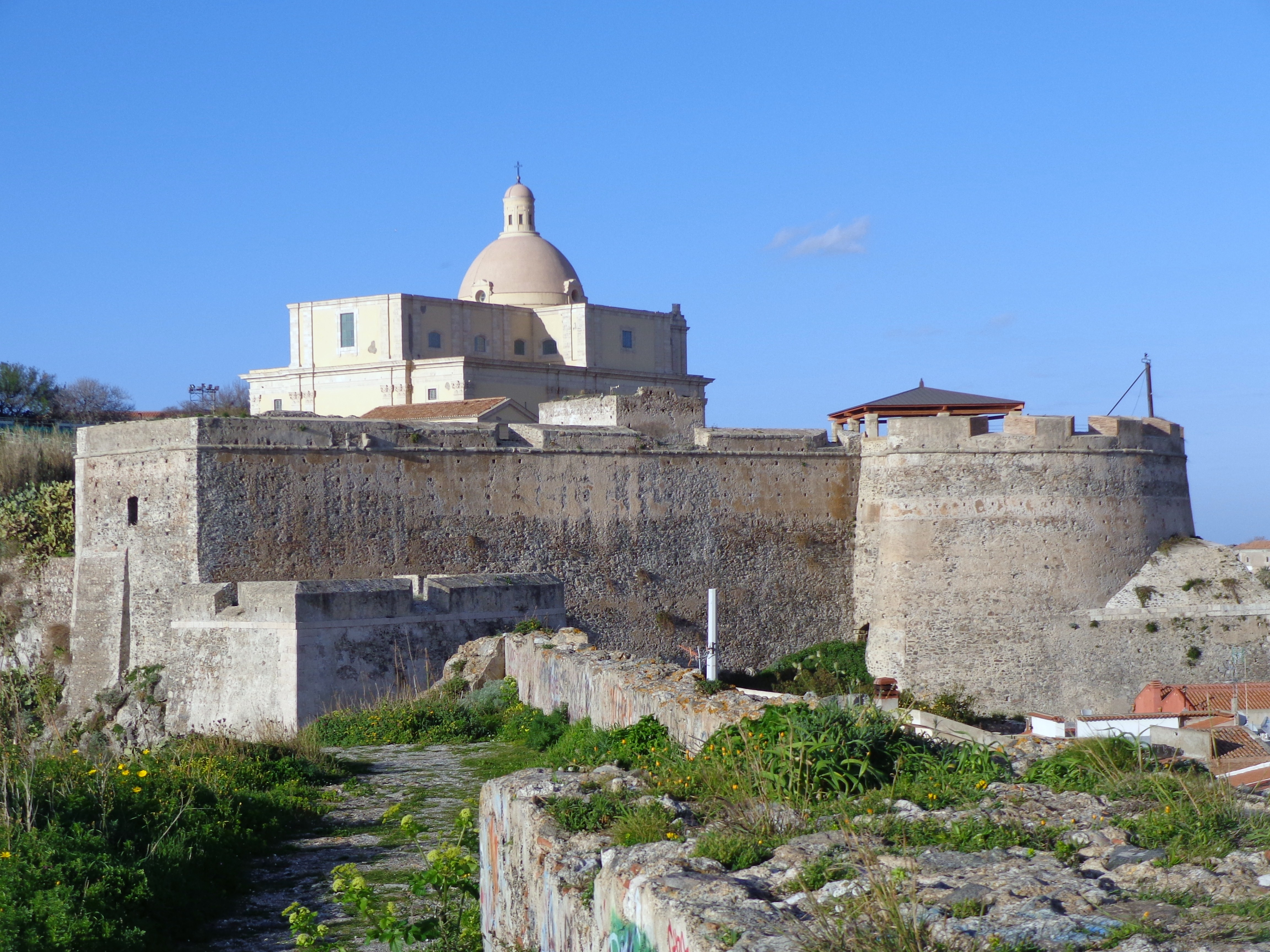 Panoramica Castello